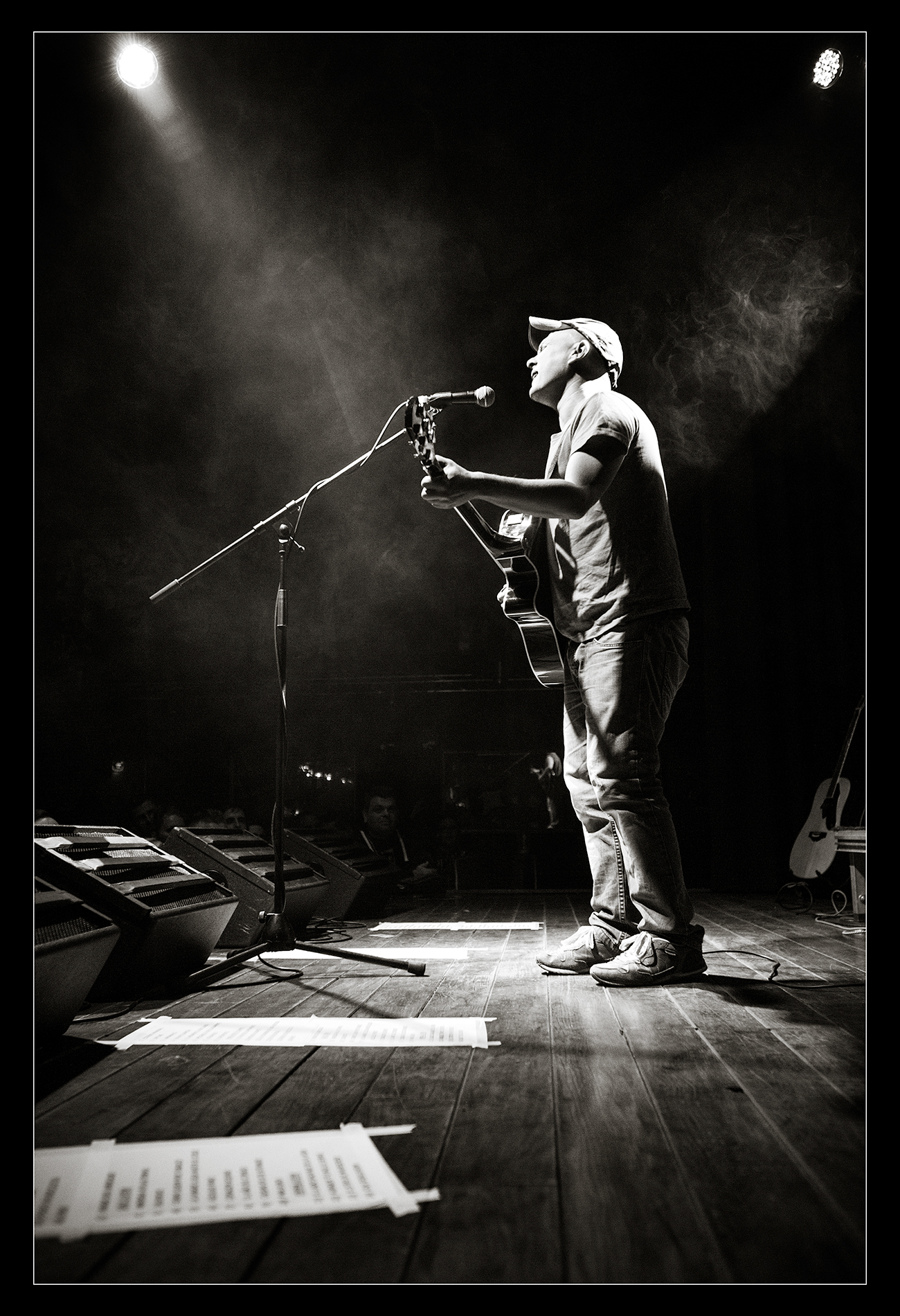 Luter tocando en Valencia en 2015.